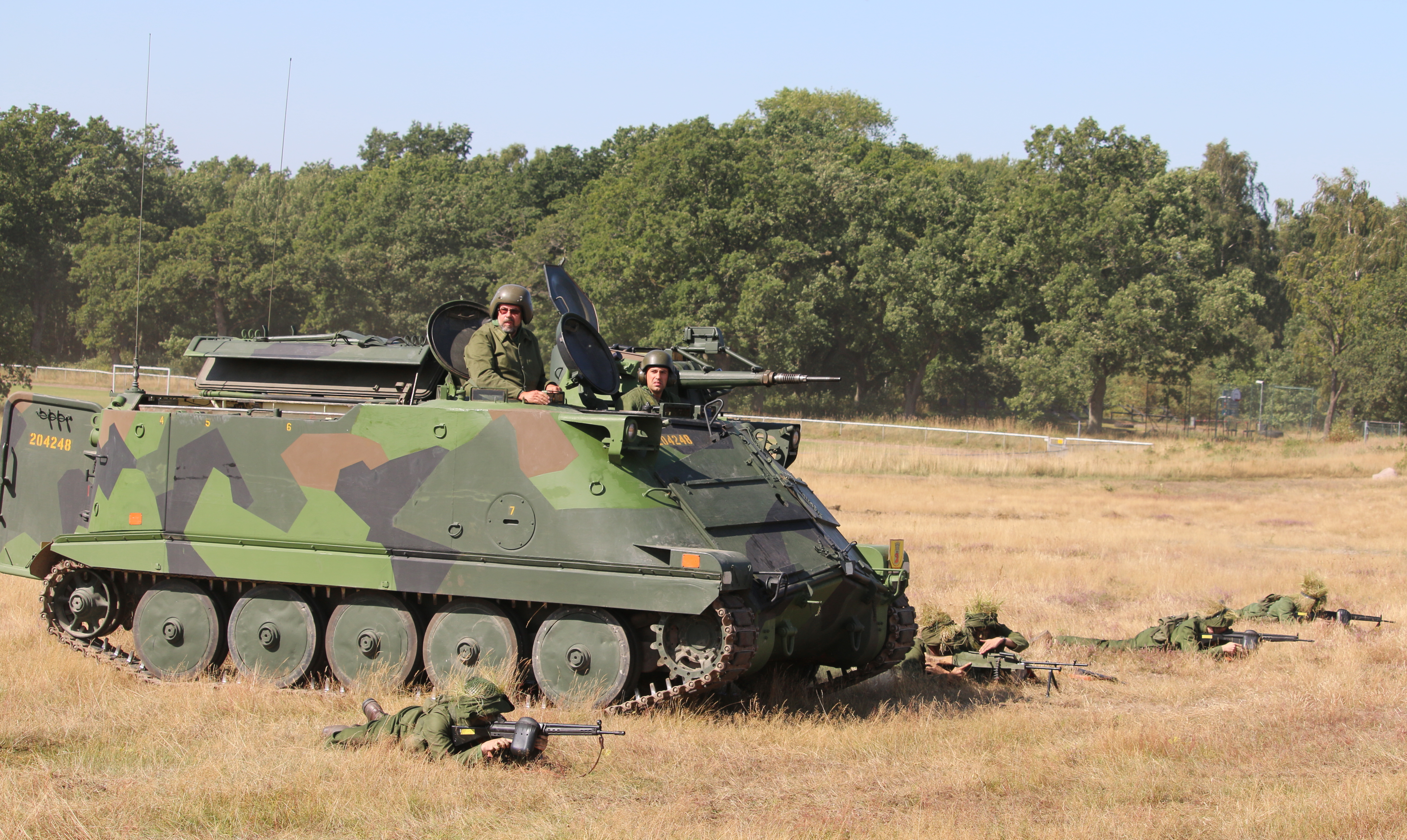 Pansarbandvagn 302 Revinge 2015